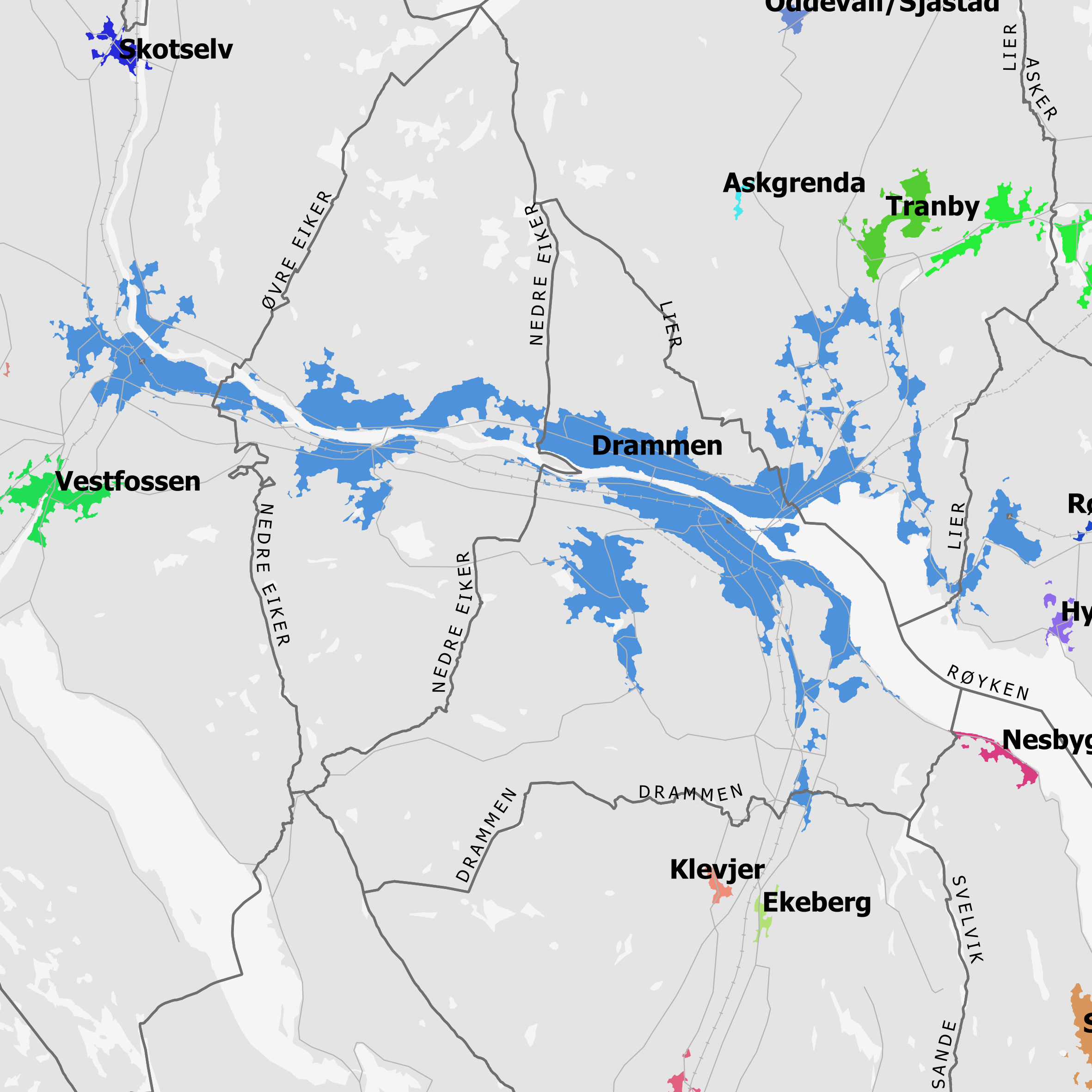 Tettsted 2003 Drammen pr. 1.1.2018